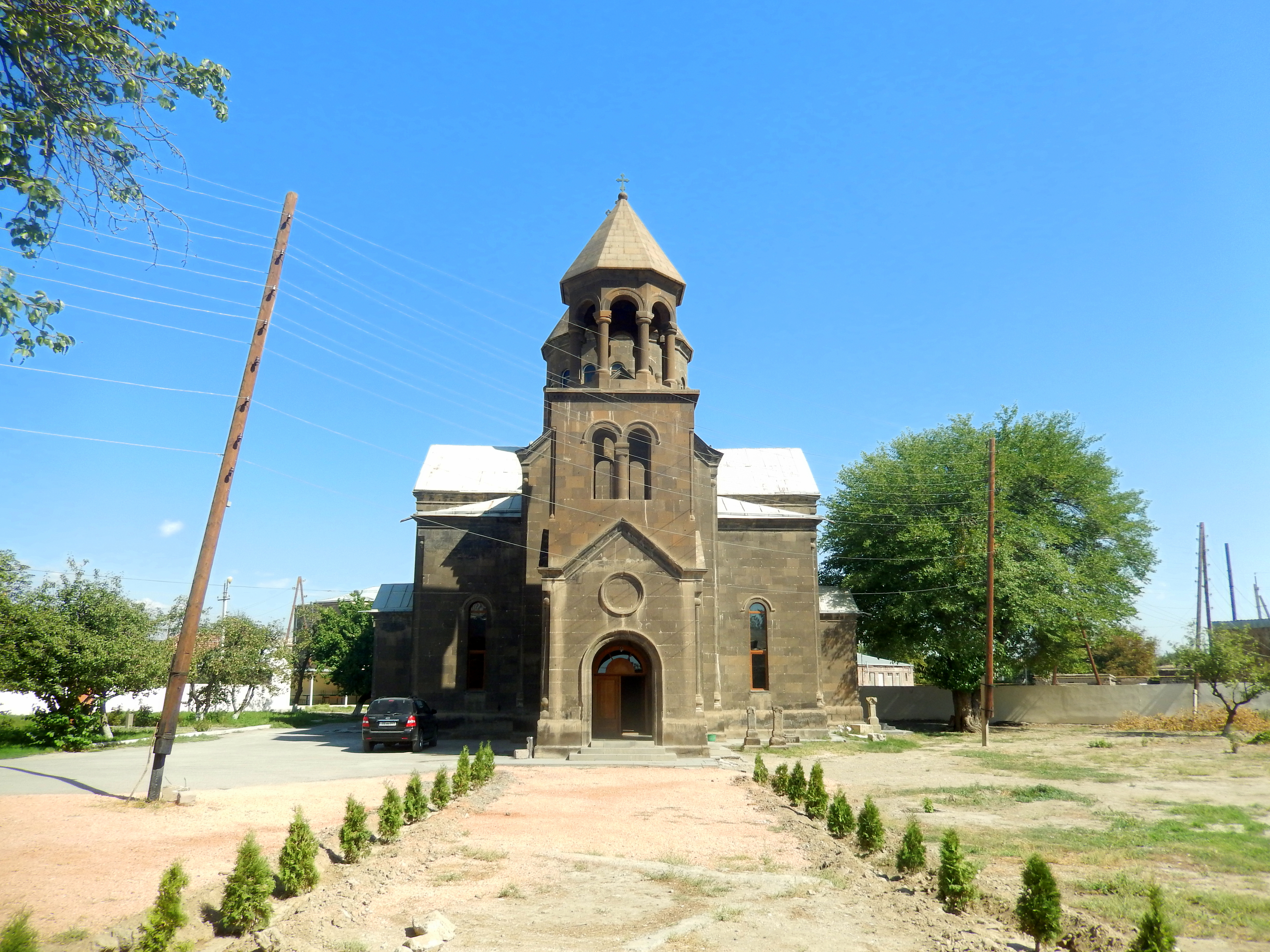 Մրգավանի Սուրբ Հակոբ եկեղեցի 61/3